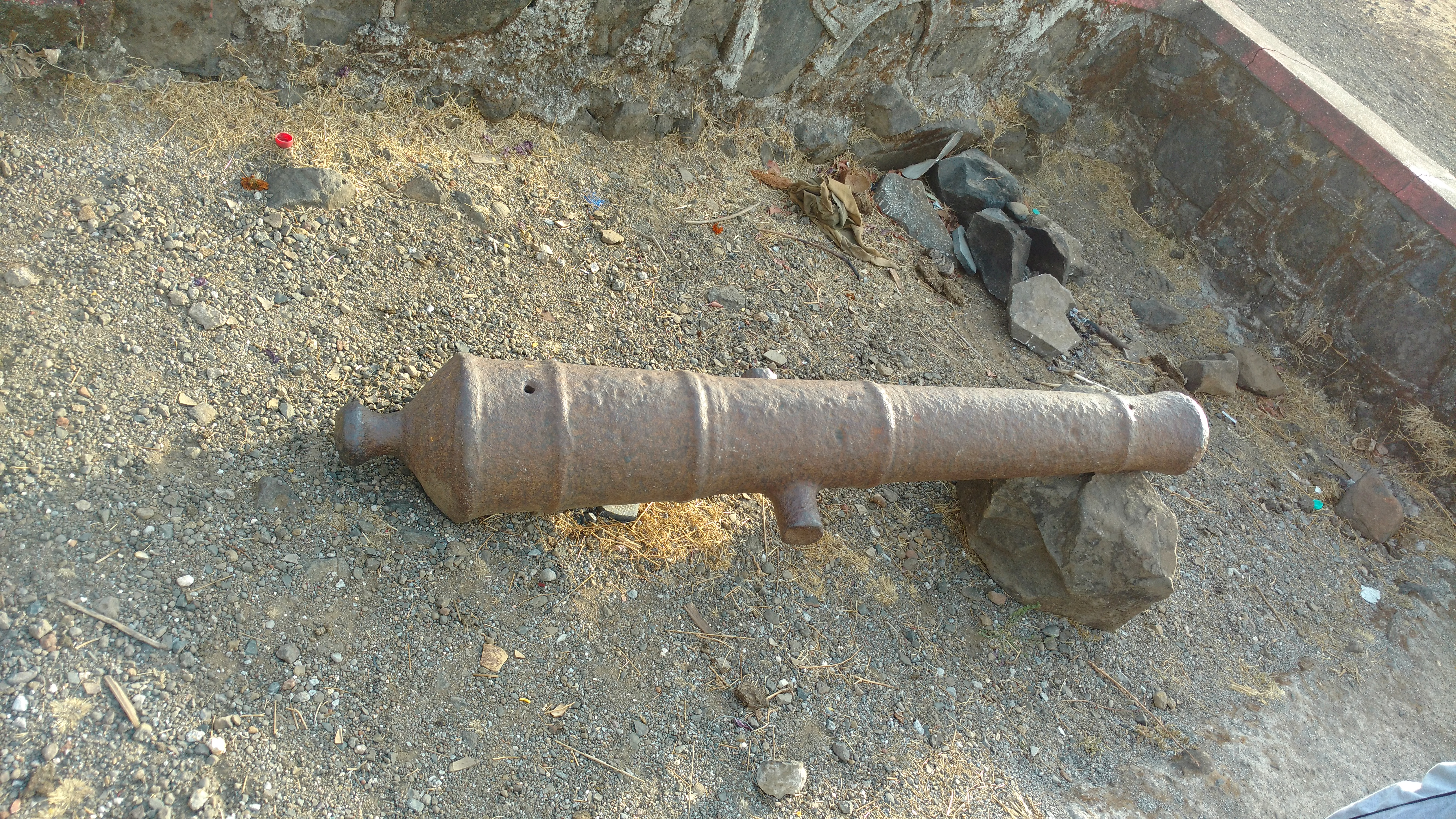 Cannon at Korigad